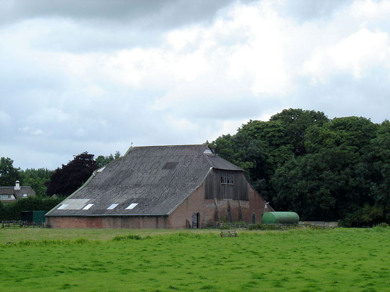 De schuur van de voormalige Steenfabriek IJsseloord in Willeskop.